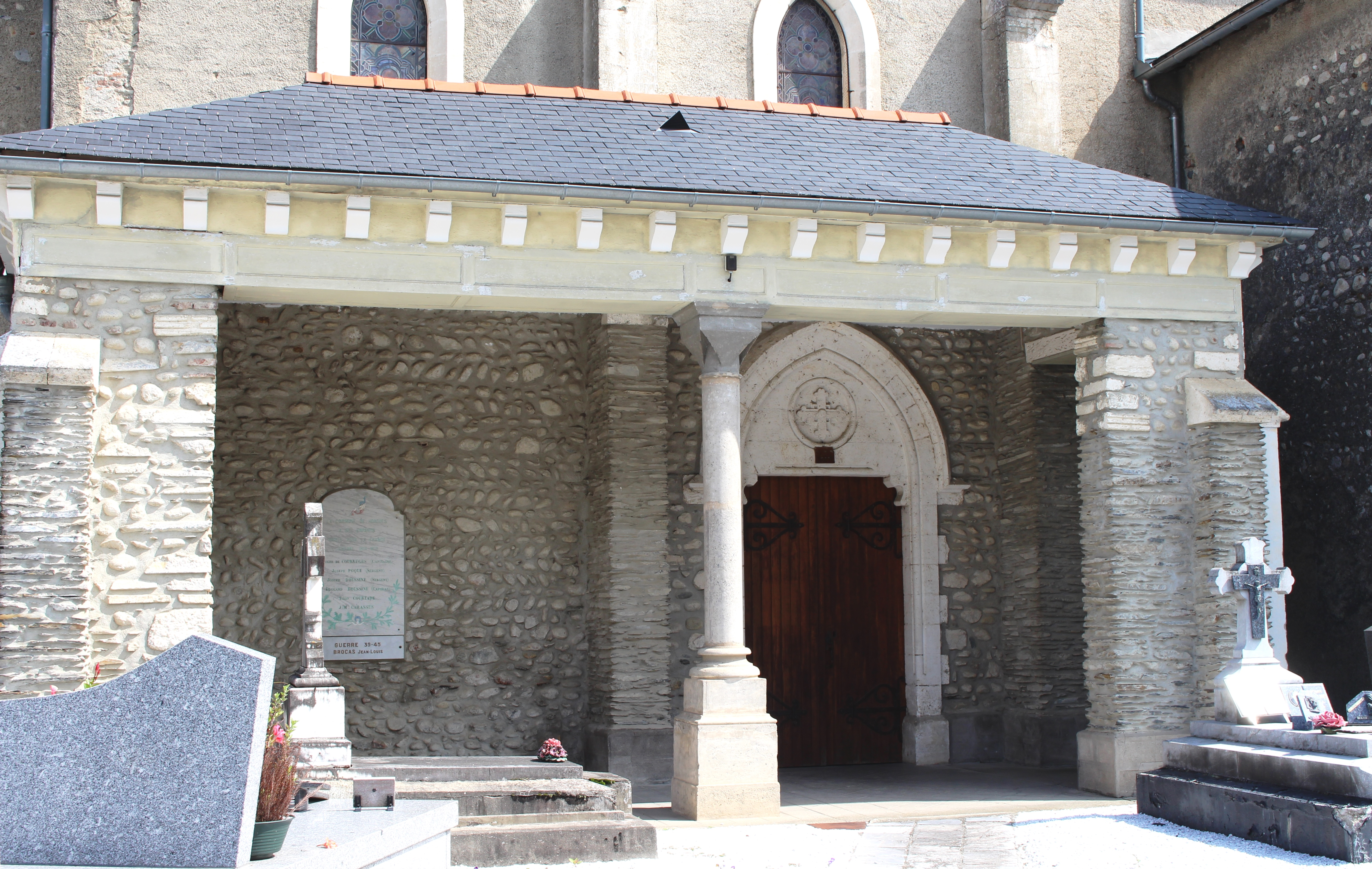 Église Saint-Mauront de Horgues (Hautes-Pyrénées)